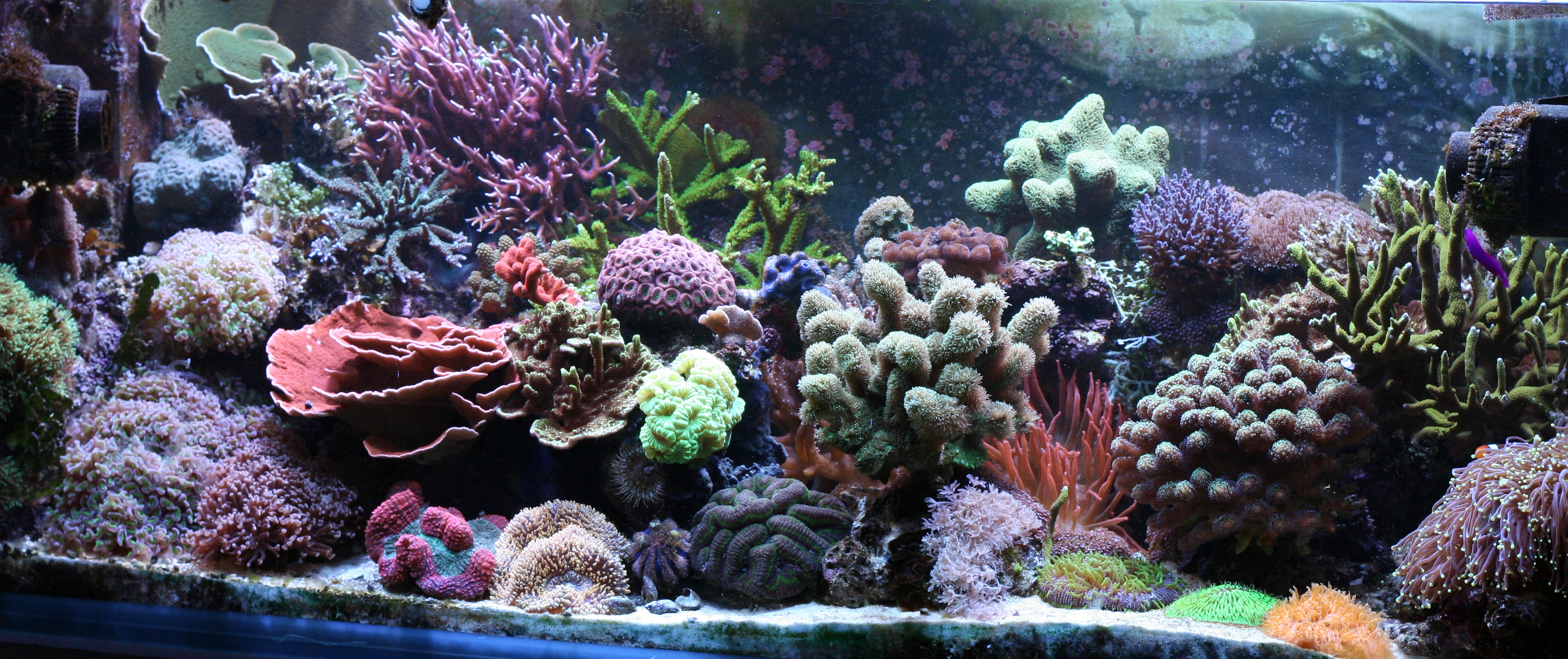 our 440 l reef tank